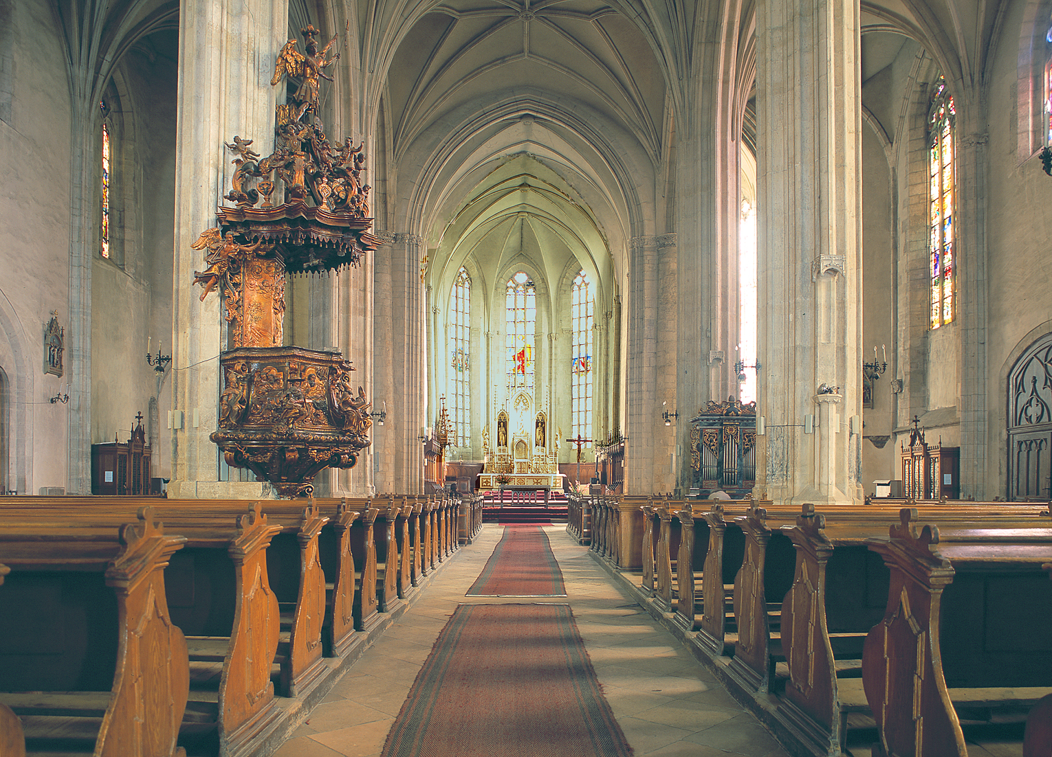 Die Michaelskirche zu Klausenburg ist eine Gotische Hallenkirche. Im Langhaus befindet sich die spätbarocke Kanzel. (Baudekmäler in Siebenbuergen Heft 37-ABFabini.)